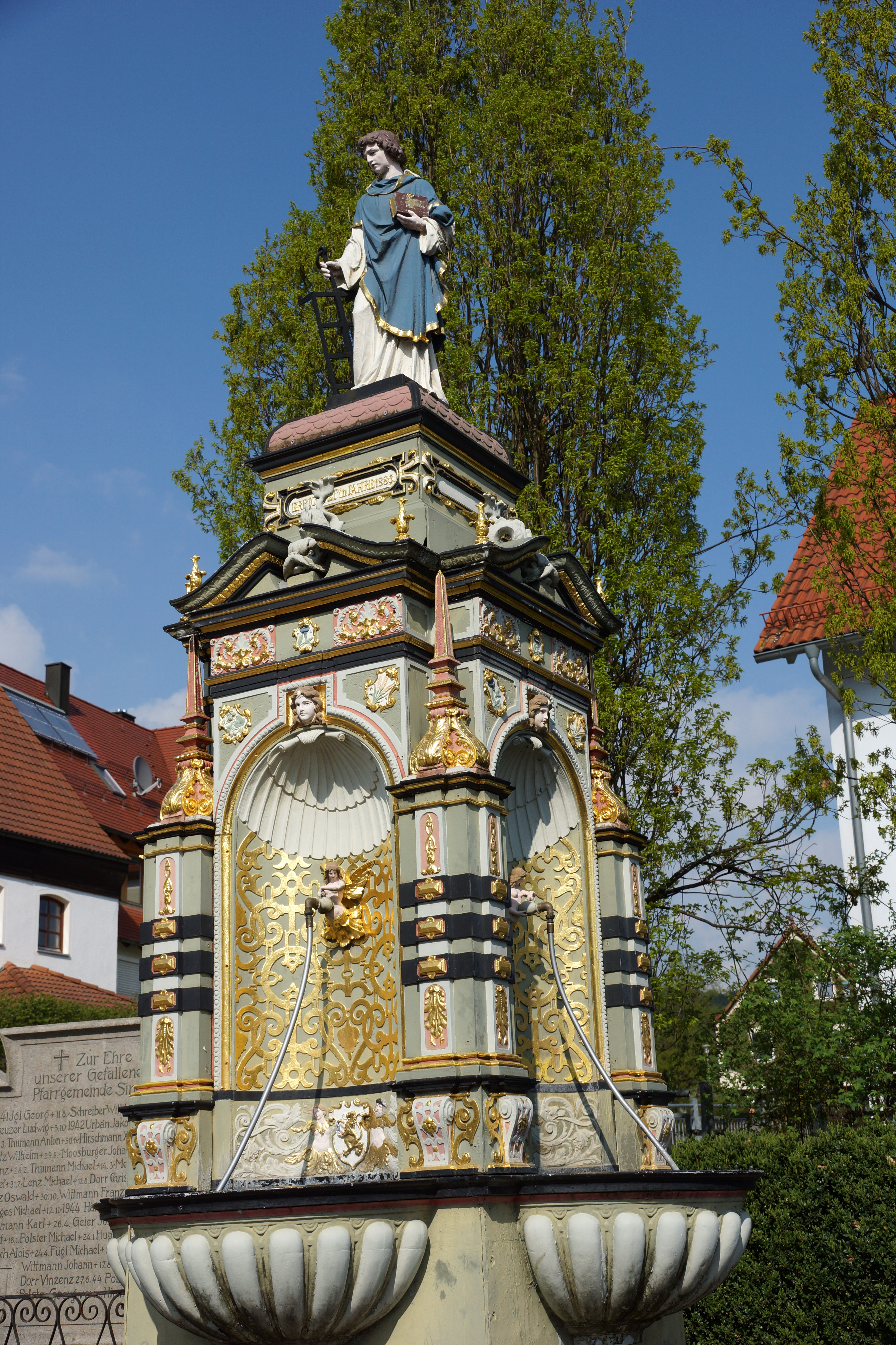 Kriegerdenkmal - St. Laurerentius / St. Laurenzius / St. Lorenz - Brunnen in Sindlbach / Gemeinde Berg - Oberpfalz